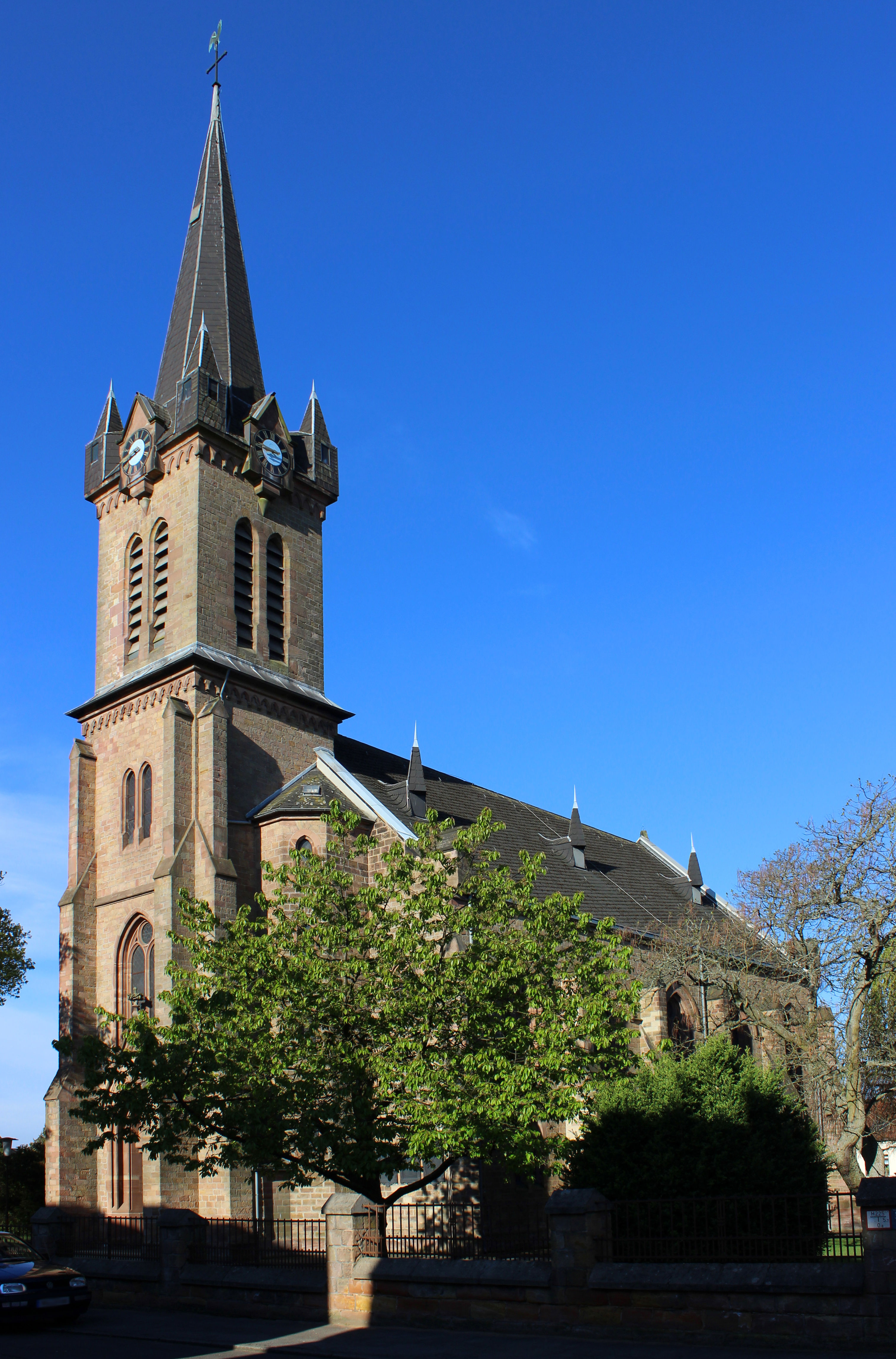 Die evangelische Kirche in Elversberg, Landkreis Neunkirchen, Saarland